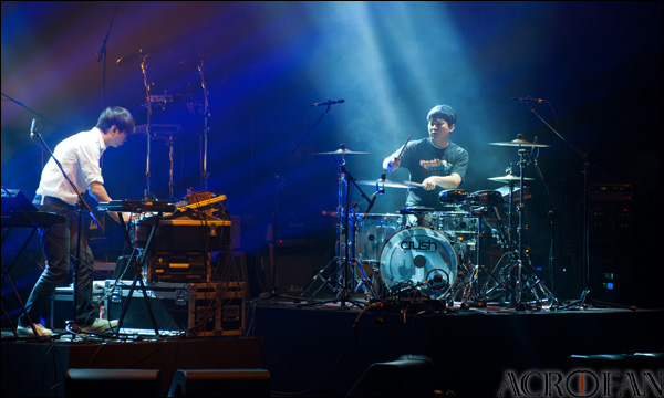 조용필 19집 앨범 '헬로(Hello)' 프리미어 쇼케이스